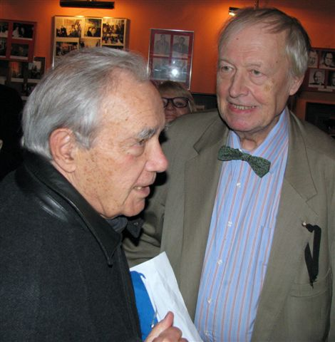 Kazimierz Piotr Zaleski (C. Pierre Zaleski) (b. March 2, 1928 in Paris) - Polish scientist (nuclear energy) and Maciej Morawski (b. 1929) - Polish journalist and publicist.